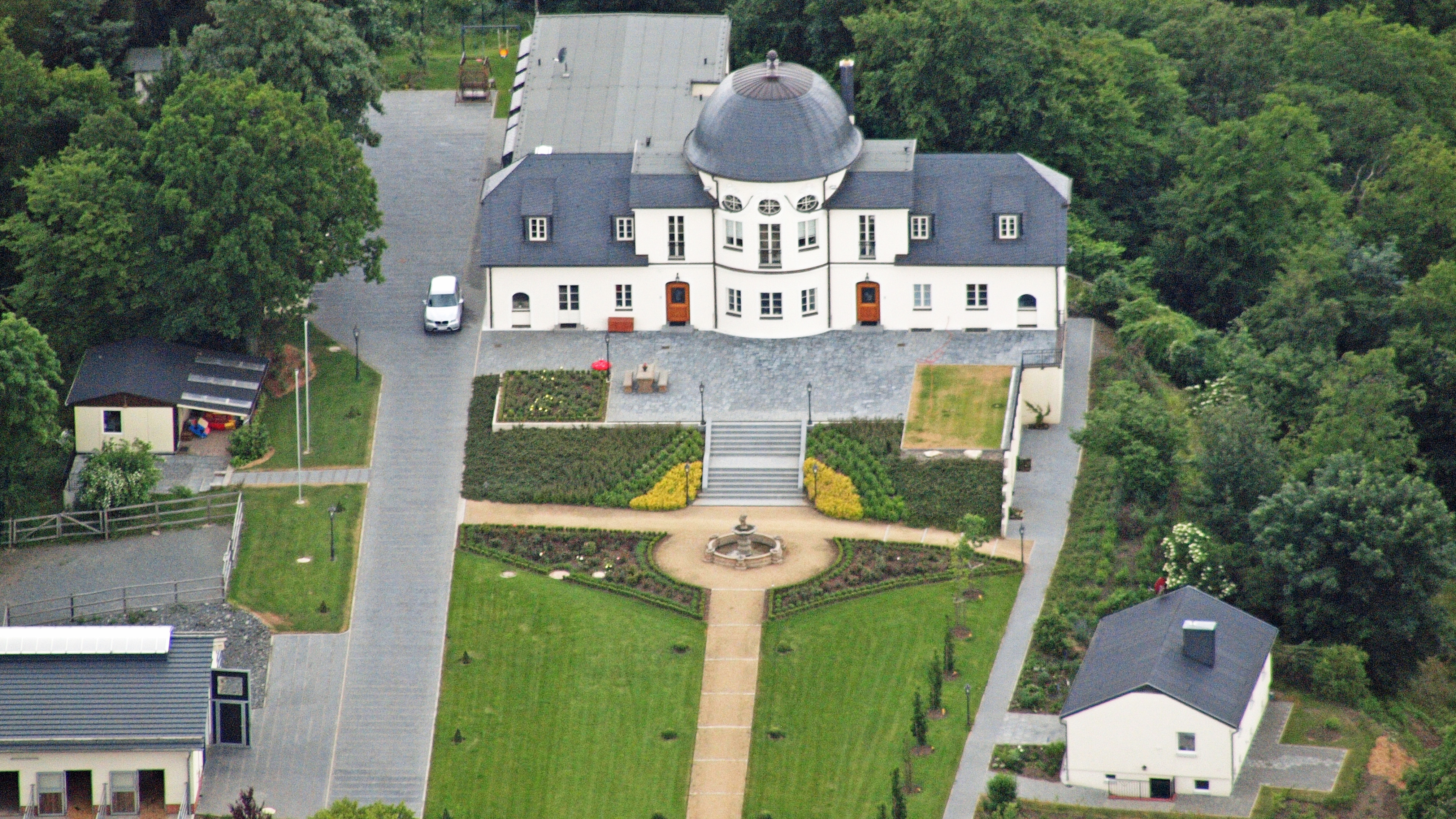 Jagdschloss Röhrkopf, Ballenstedt: Luftaufnahme